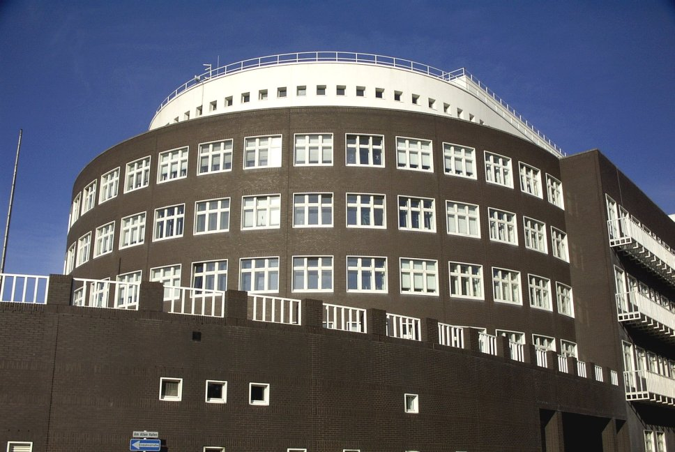 AWI in Bremerhaven, von Uwe H. Friese (Vulkan) aus Bremerhaven 2002 selbst fotografiert.